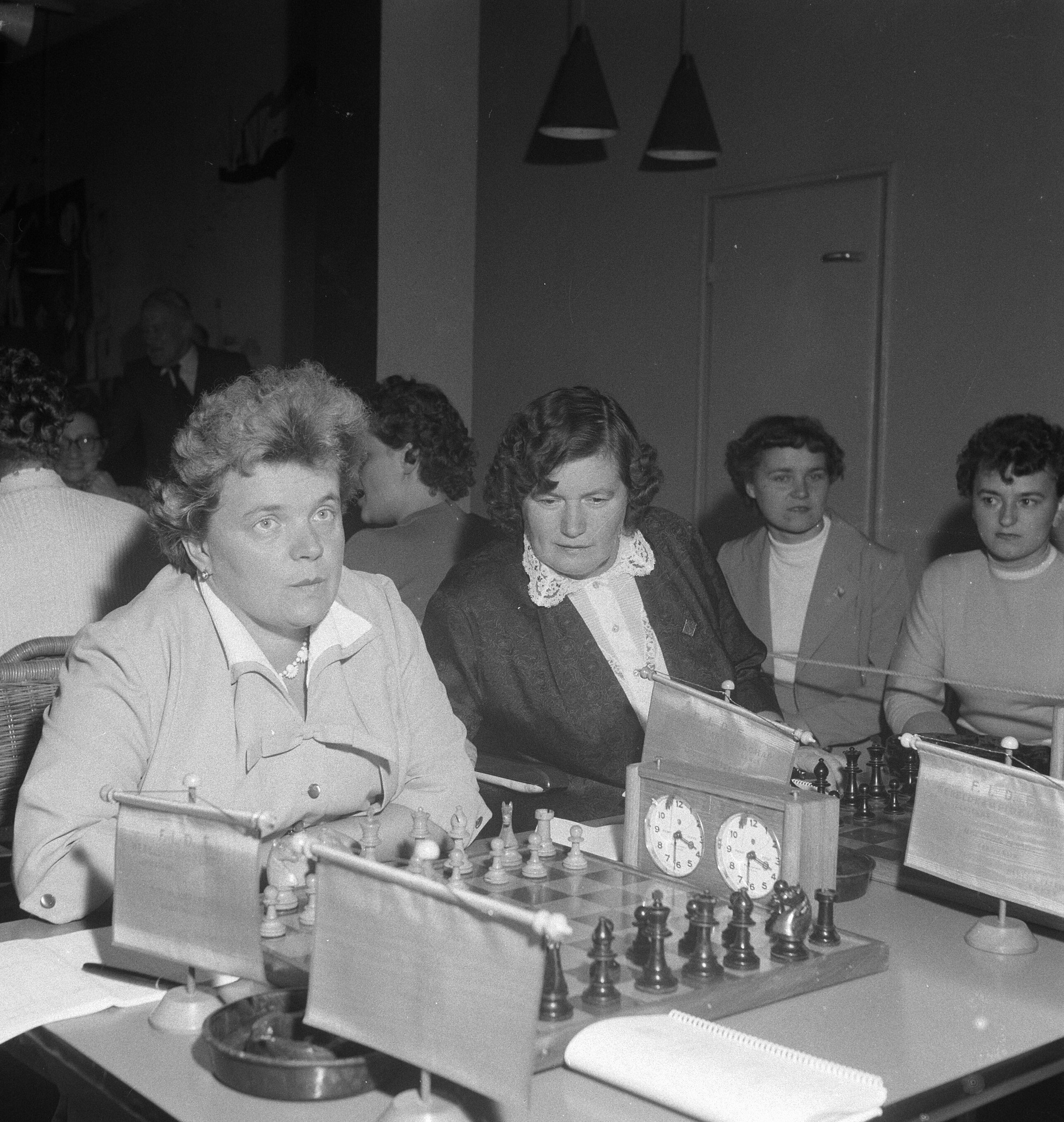 Collectie / Archief : Fotocollectie Anefo Reportage / Serie : [ onbekend ] Beschrijving : Eerste ronde Internationaal Damesschaaktoernooi te Emmen Datum : 3 september 1957 Locatie : Emmen Trefwoorden : Schaken, ronden Fotograaf : Koch, Eric / Anefo Auteursrechthebbende : Nationaal Archief Materiaalsoort : Negatief (zwart/wit) Nummer archiefinventaris : bekijk toegang 2.24.01.03 Bestanddeelnummer : 908-9175